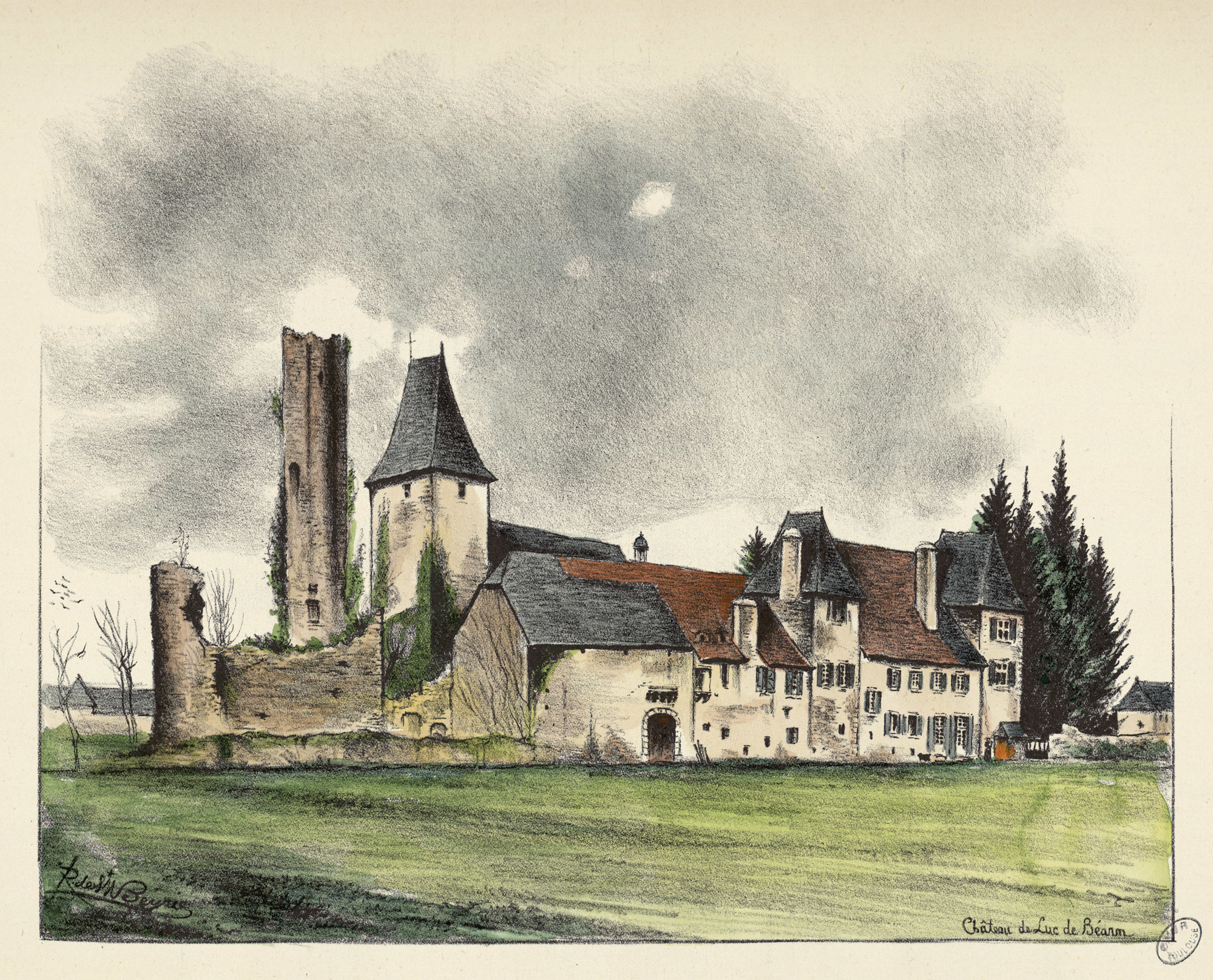 Ancely, René (1876 - 1966). Possesseur